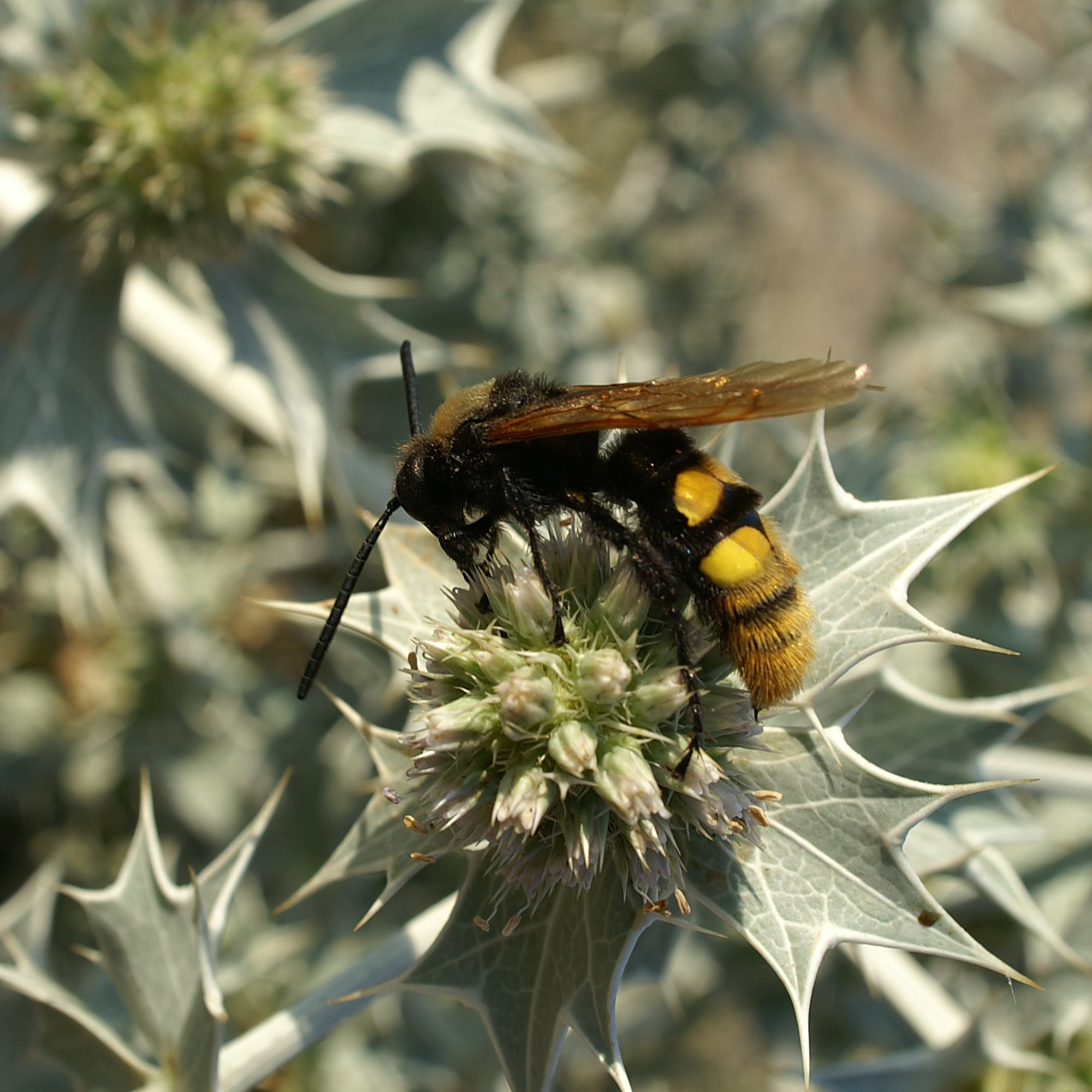 Scolia sp.